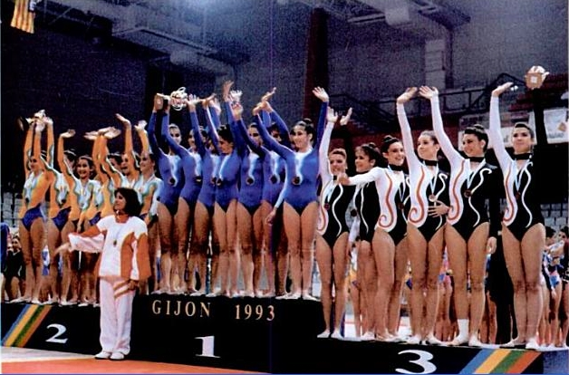 Podio de la primera categoría en el Campeonato de España de Conjuntos en Gijón (1993). Escuela de Gimnasia Cepsa-Tenerife con el oro, Club Atlético Montemar de Alicante con la medalla de plata y E.G.R. Madrid de Madrid con el bronce.